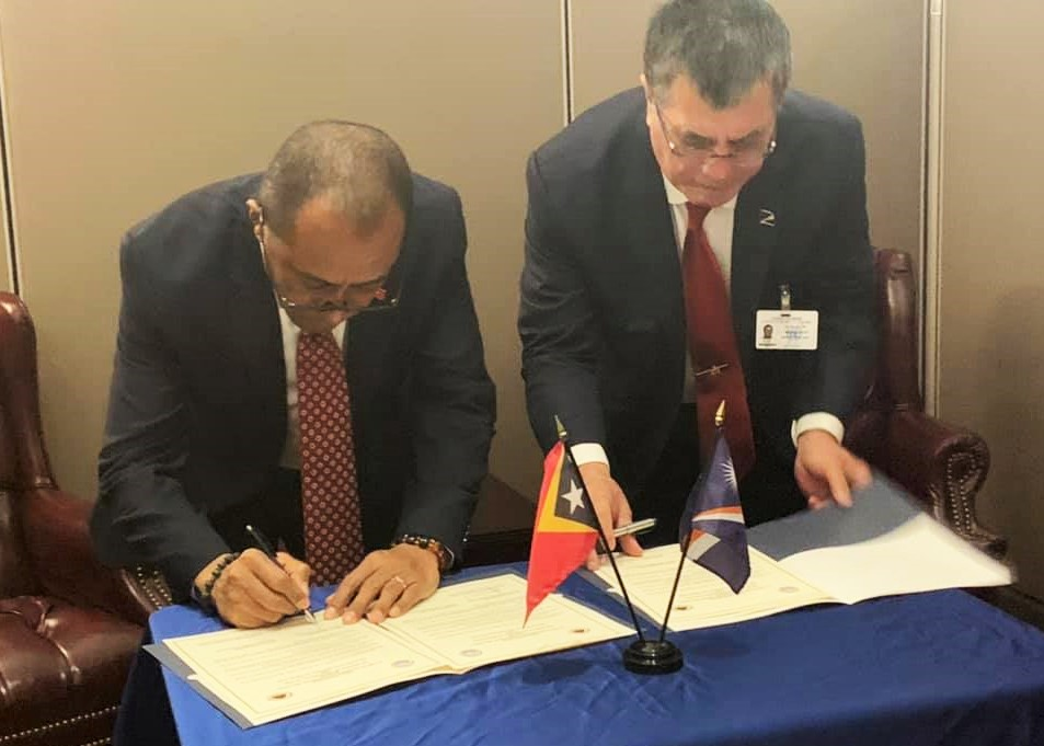 Dionísio Babo Soares und John M. Silk